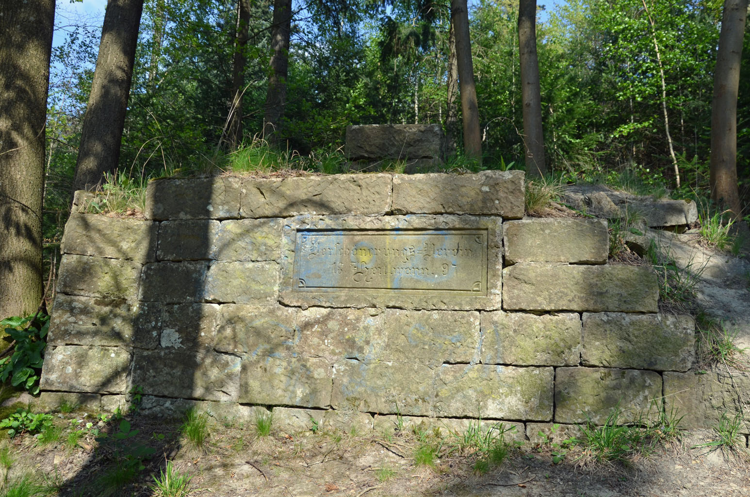 nicht näher identifizierter Steinsockel am Böckinger Backenweg im Heilbronner Stadtwald. Inschrift: „Verschönerungs-Verein Heilbronn 1897“.